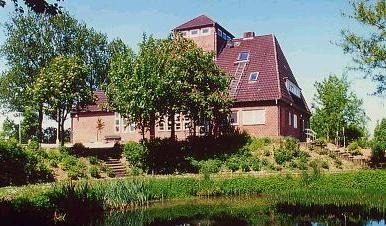 Ev. Jugend- und Freizeitzentrum NEULANDHALLE, Dithmarschen